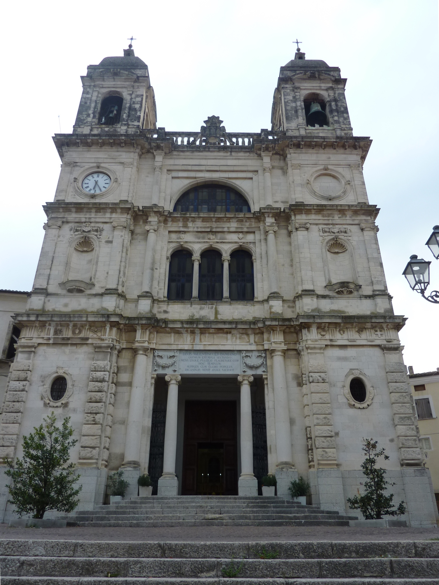 San Valentino in Abruzzo Citeriore: Duomo